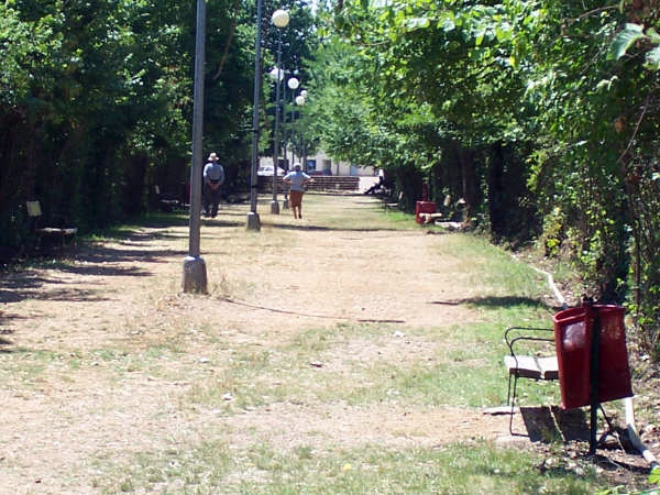 "El Jardin", a park in Villamanan